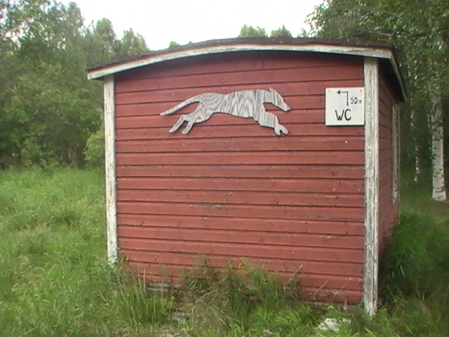 Kempeleen Juurussuon kylässä sijaitsevan entisen vanhan vinttikoiraradan toimistorakennus.